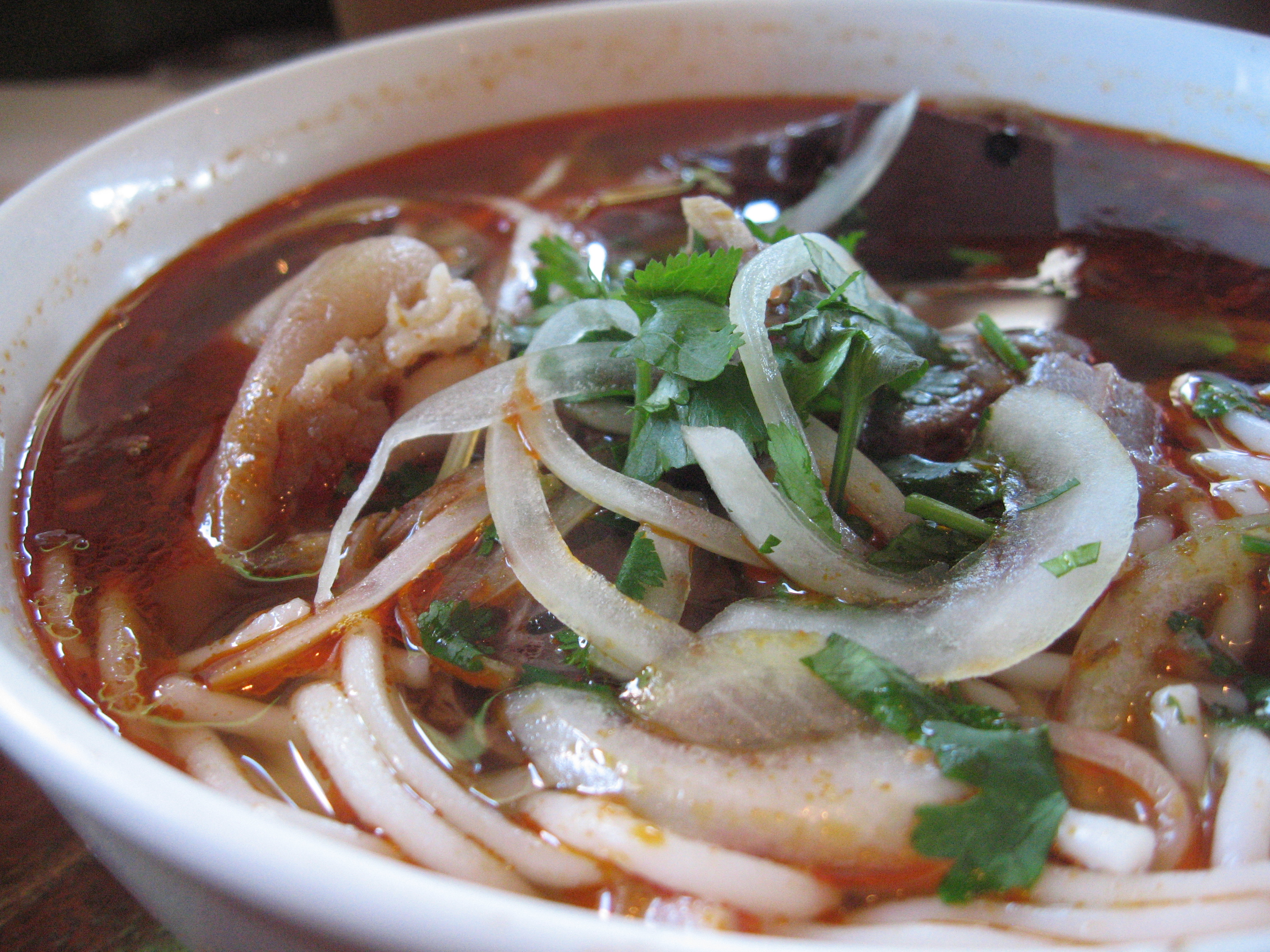 Bún bò Huế